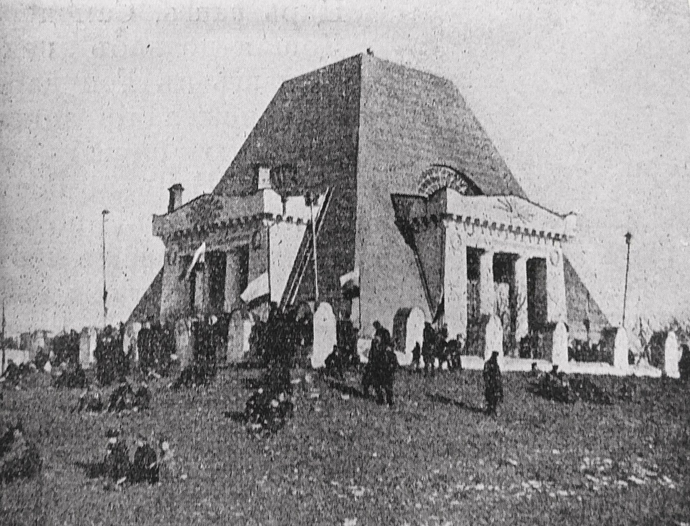 Храм-памятник воинам, павшим при взятии Казани в 1552 году (Храм-памятник в честь Нерукотворе́нного Образа Спасителя) (г. Казань). Патриотическая манифестация у храма-памятника.